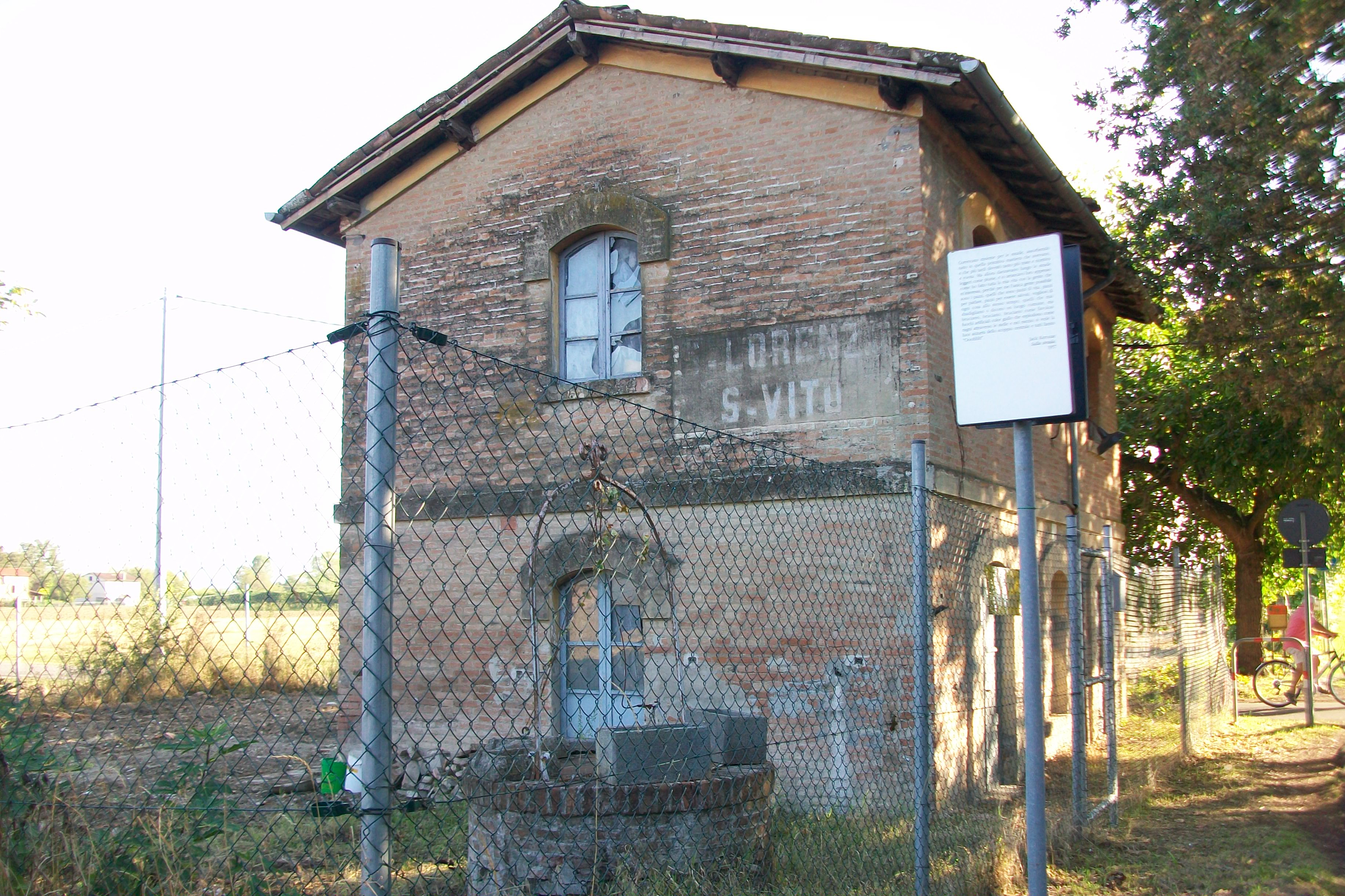 ex-stazione ferroviaria di San Lorenzo-San Vito della linea dismessa Modena-Vignola